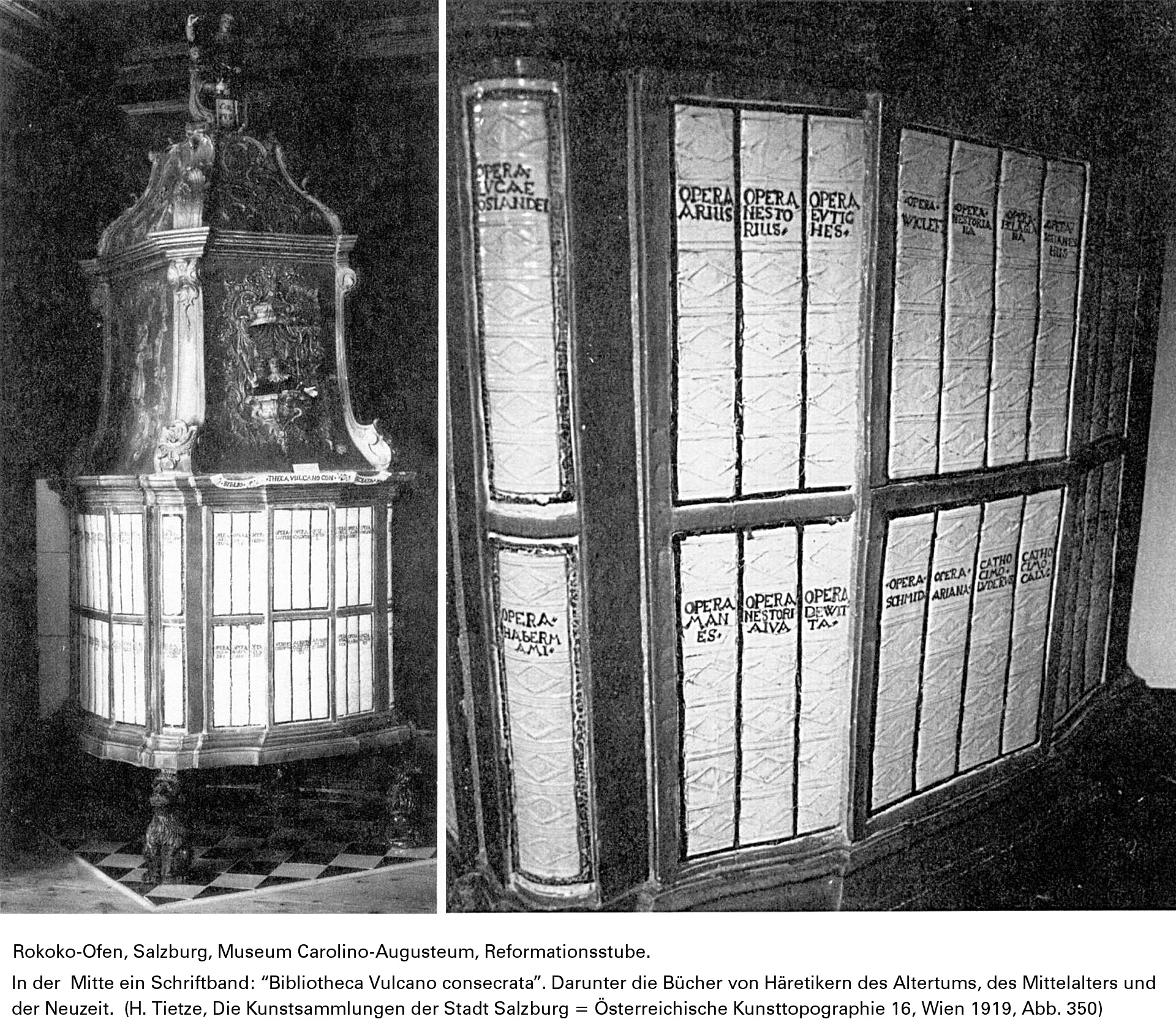 Katholische Propagierung der Bücherverbrennung antiker, mittelalterlicher und neuzeitlicher Bücher während des 18. Jahrhunderts. Nach Vorlagen von 1919, zusätzlicher Bildverbesserung selbst erstellt, lizenziert mit der GNU-Lizenz für freie Dokumentation" Originale: Bearbeitungen